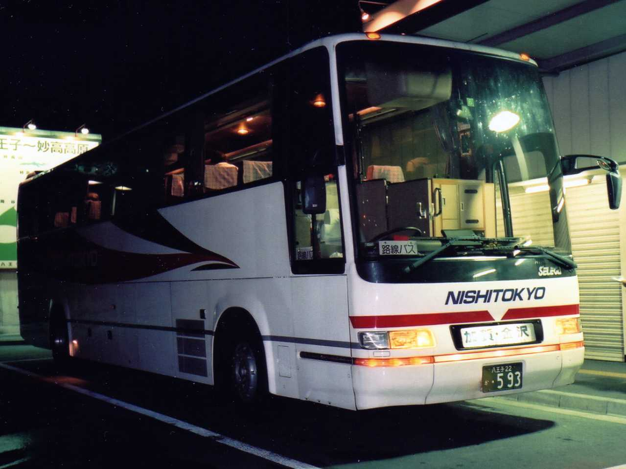 Nishi Tokyo Bus Hino U-RU3FTAB at Hachioji Highway Bus Terminal